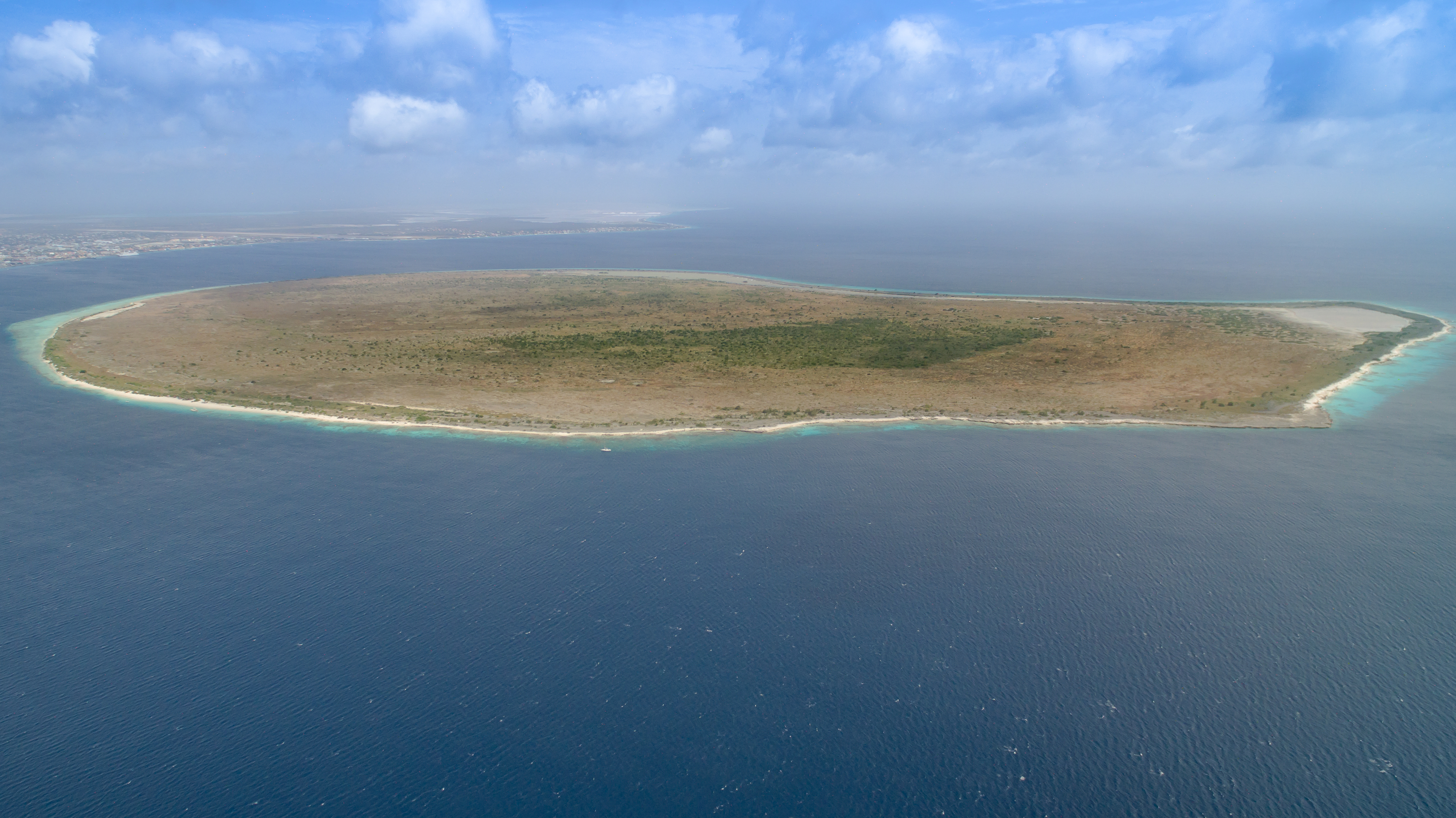 Klein Bonaire Curacao aerial